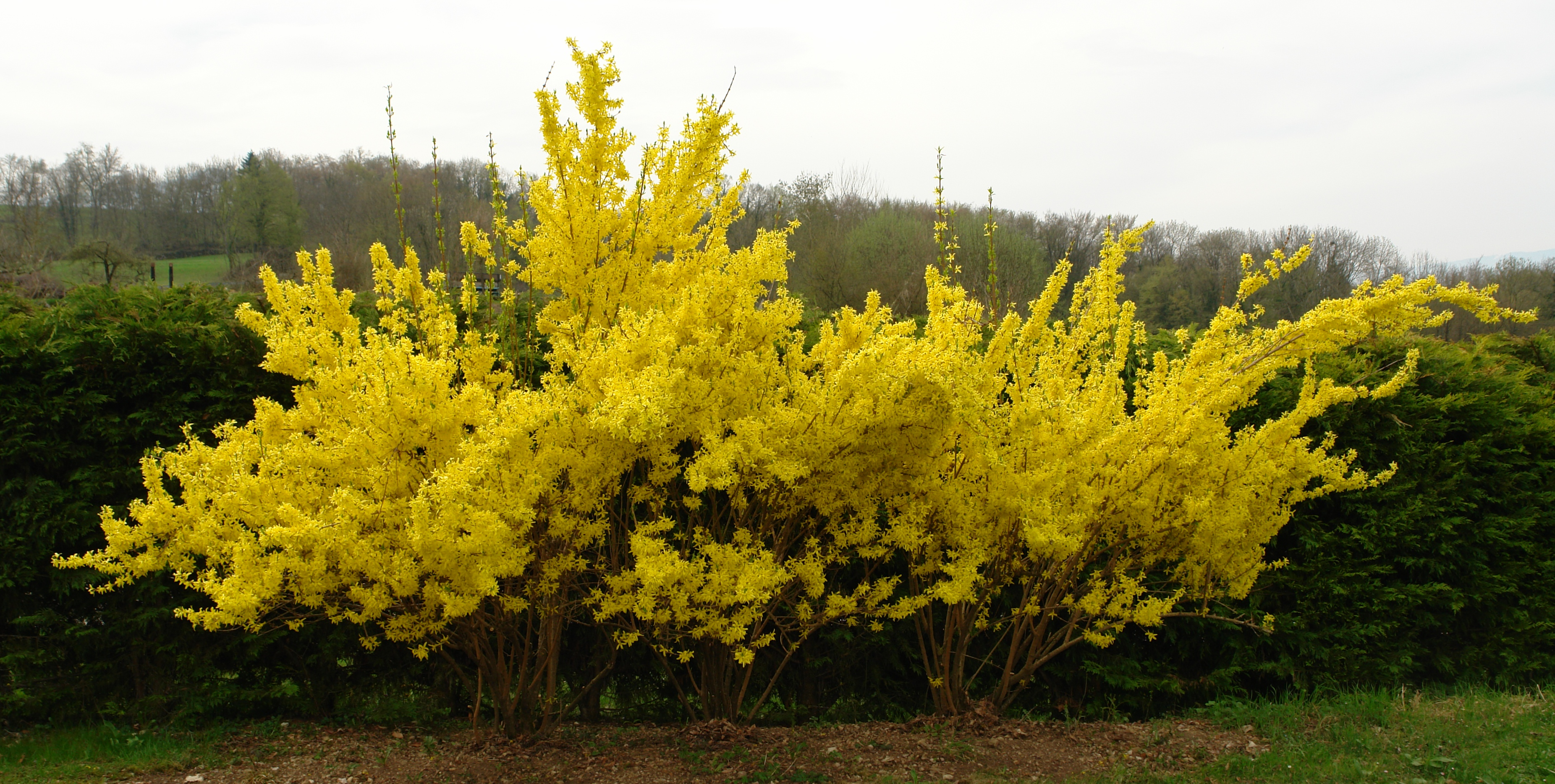 Forsythia.